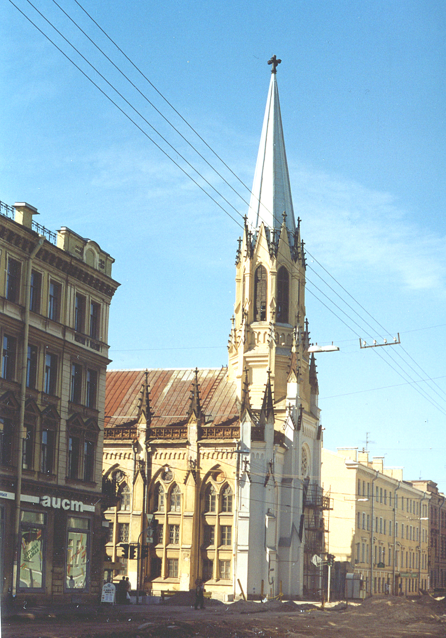 Кирха св.Михаила (Средний пр. В.О., 18 / 3-я линия, 32)